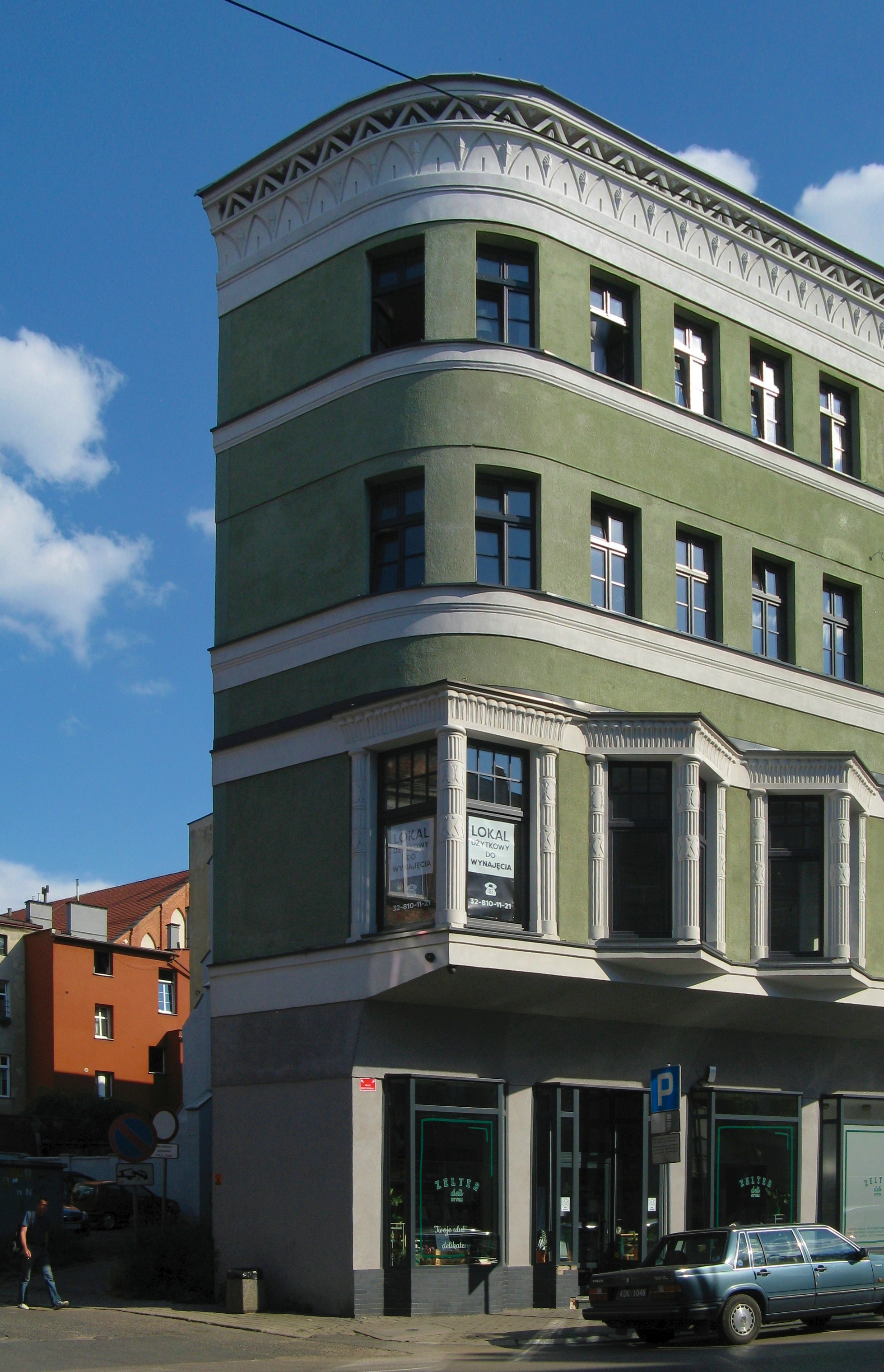 Hansa Haus, ul. Stanisława Webera 4 w Bytomiu, widok na narożnik z północnego zachodu, na parterze sklep Zelter Deli, w tle po lewej stronie fragment fasady fary na Rynku